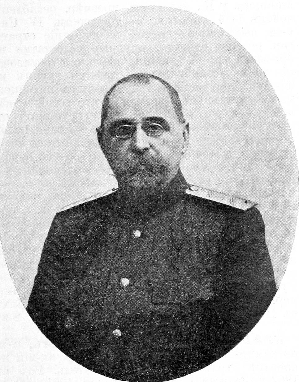 Это изображение было использовано для иллюстрирования статьи «Кладо, Николай Лаврентьевич» опубликованной в двенадцатом томе «Военной энциклопедии», который был издан книгоиздательским товариществом И. Д. Сытина в 1913 году в столице Российской империи городе Санкт-Петербурге. Более подробное описание к этой картинке можно прочесть в указанной выше статье.